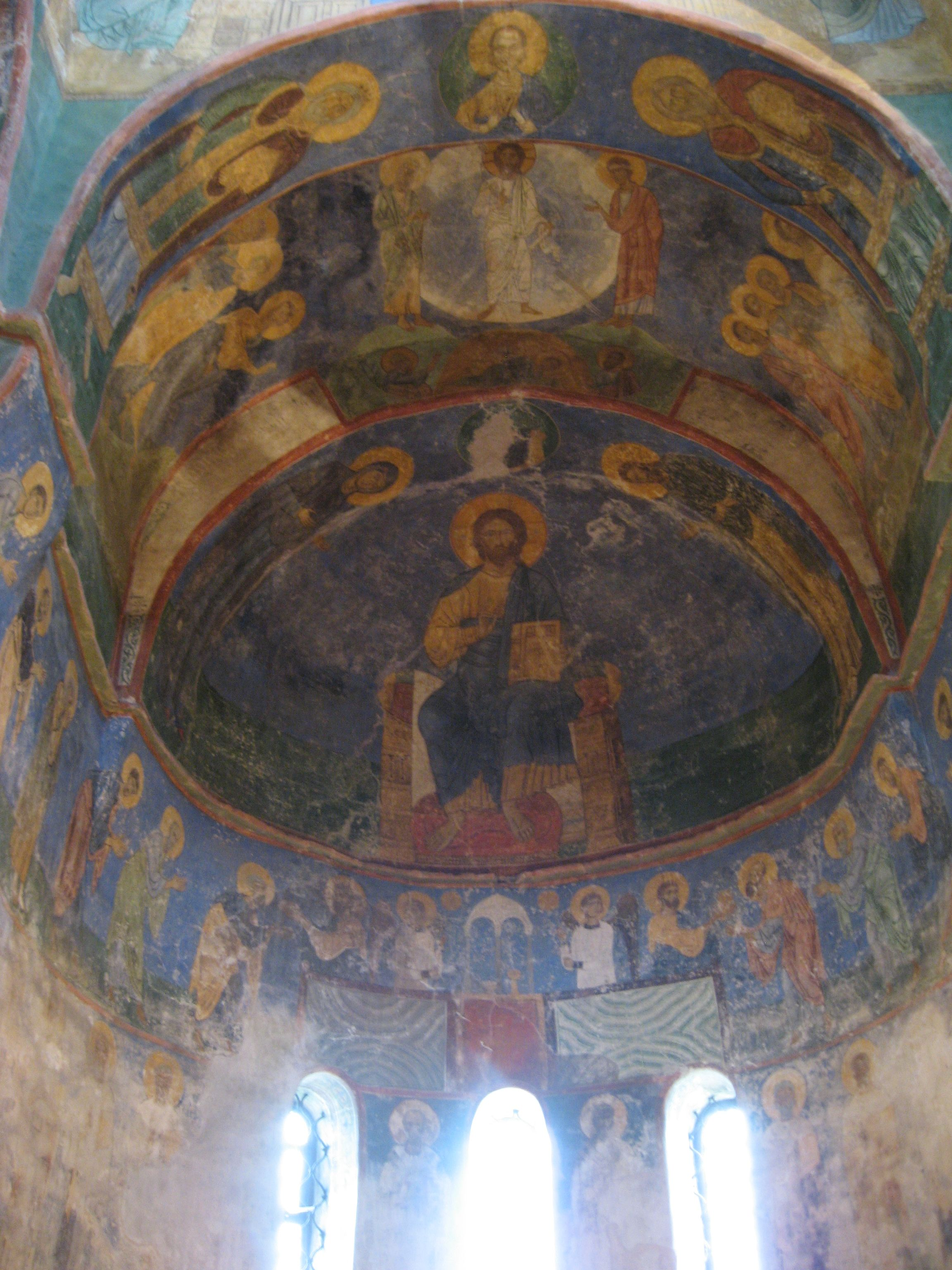 Апсида собора Мирожского монастыря. Псков.